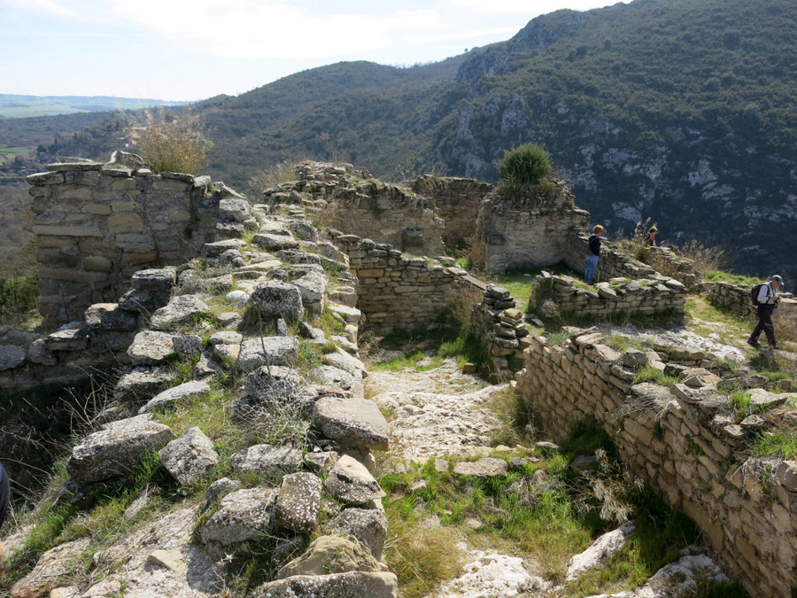 Castell de Malagastre, Foradada, comarca de la Noguera - Catalunya